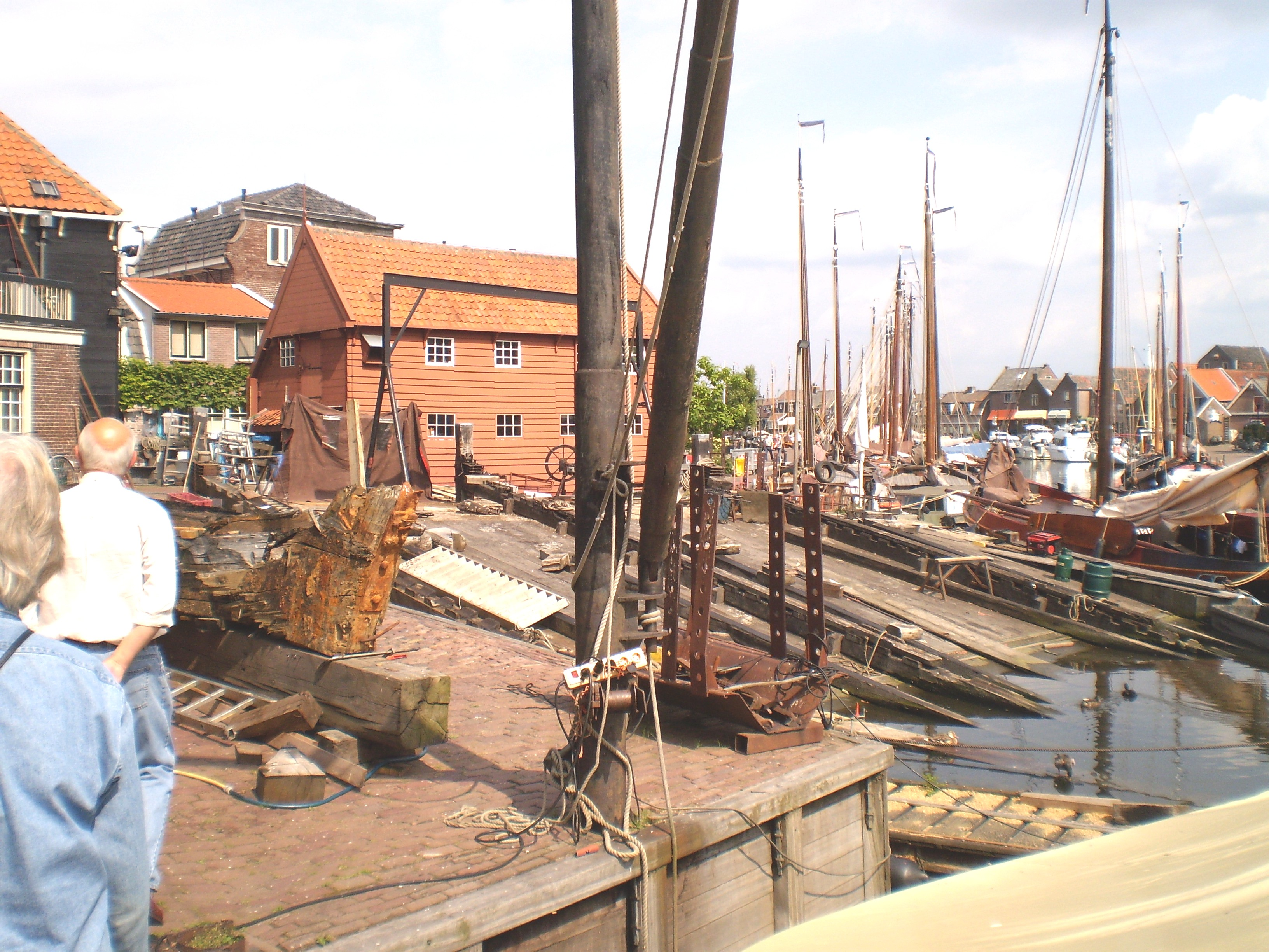 Ofbyld oanbean troch Swarte Kees op 20 augustus 2009